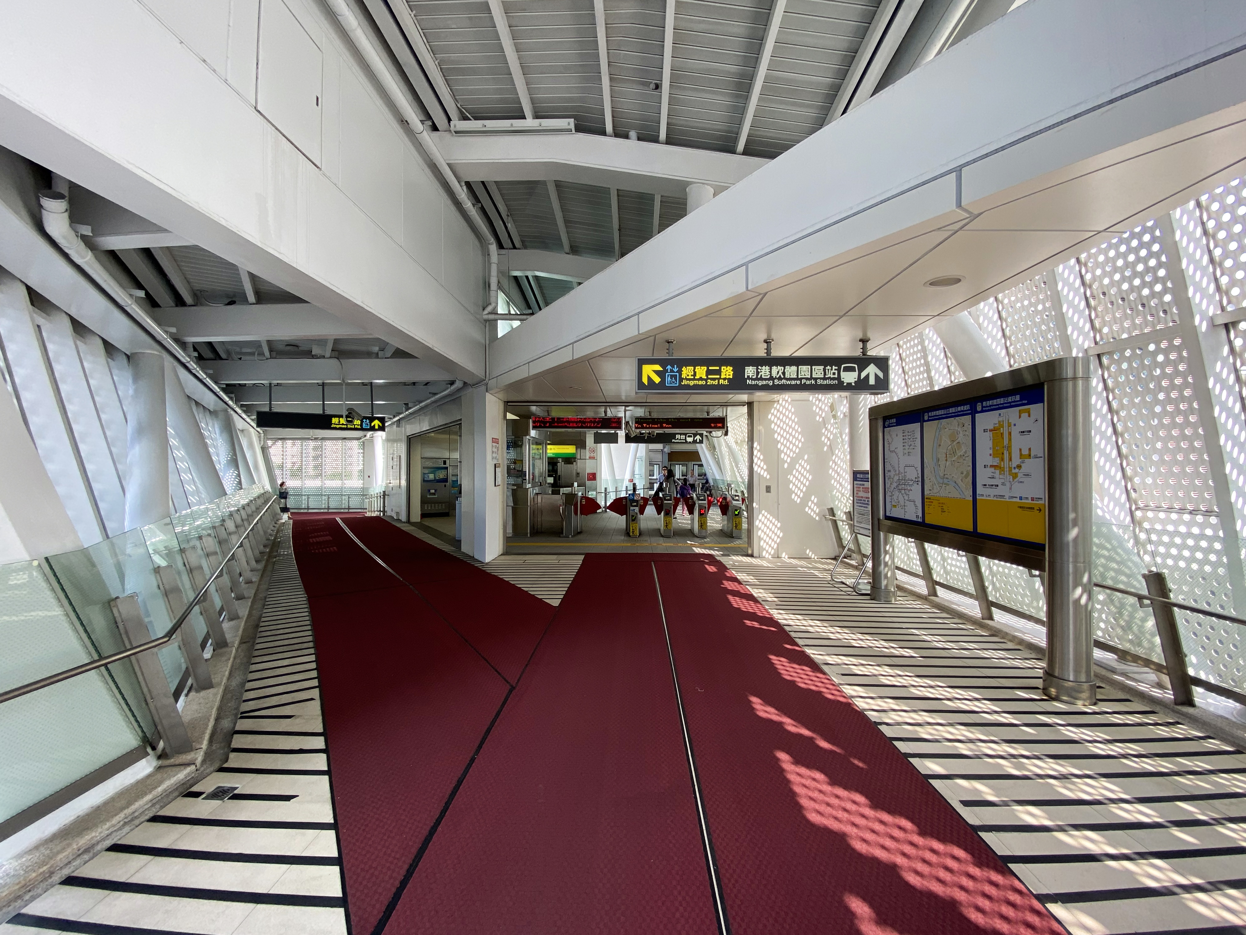 Nangang Software Park Station